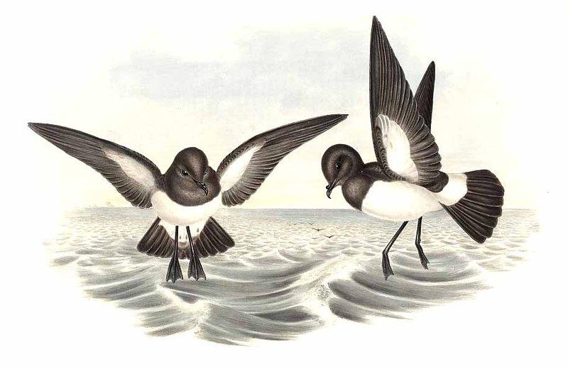 Océanite à ventre blanc